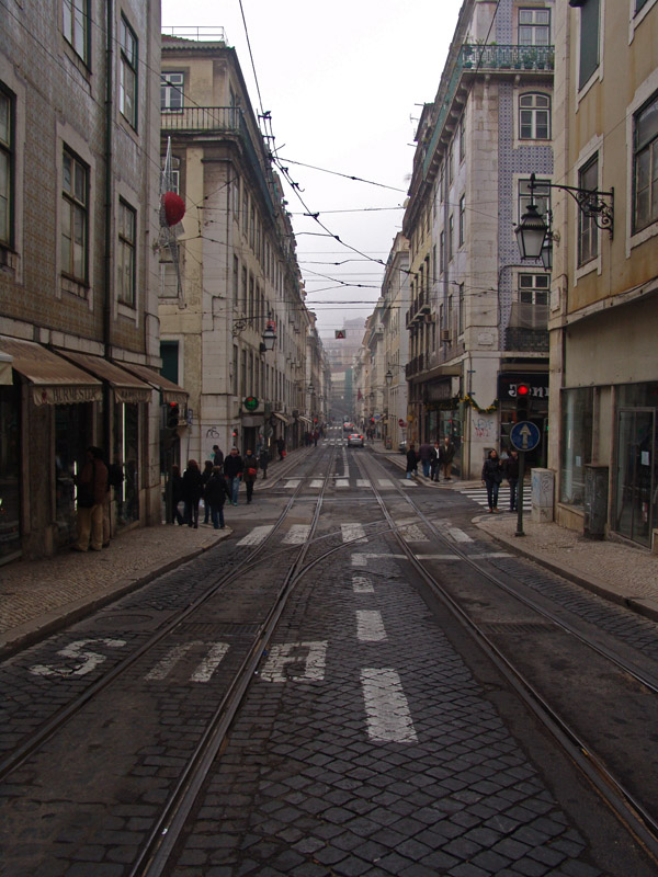 Calle de Lisboa